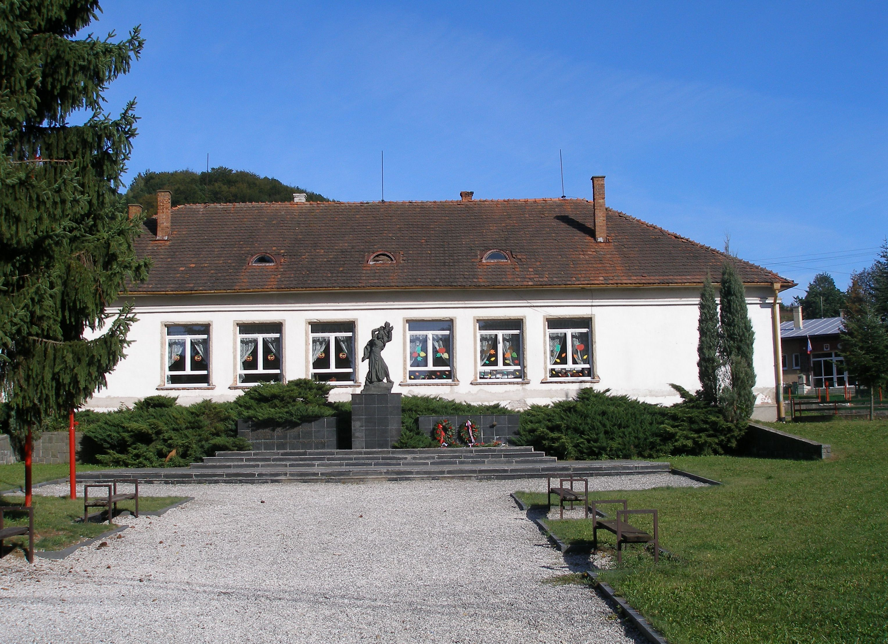 Pamätník v obci Zlatá Baňa okres Prešov. Nápis na pamätníku znie: ABY SME NIKDY NEZABUDLI NA BARBARSKÉ VYPÁLENIE OBCE ZLATÁ BAŇA DŇA 8.9.1944 NEPRIPUSŤME HRÔZY VOJNY. Súsošie na pamätníku s názvom Útek z horiacej obce. Autor F.Gibala. This medium shows the protected monument with the number 707-1495/0 in the Slovak Republic.